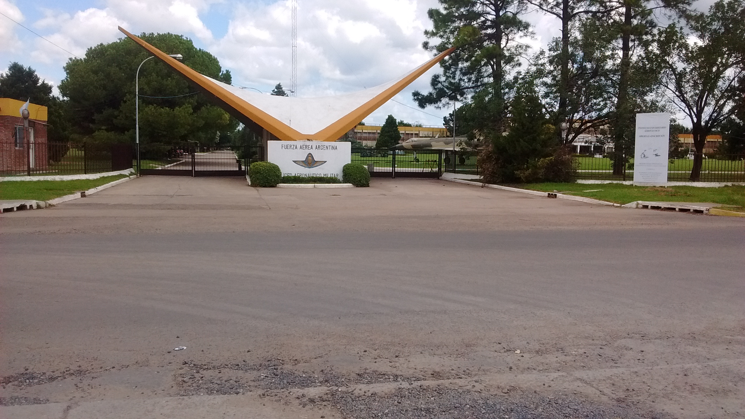 Entrada al Liceo Aeronáutico Militar en Funes.